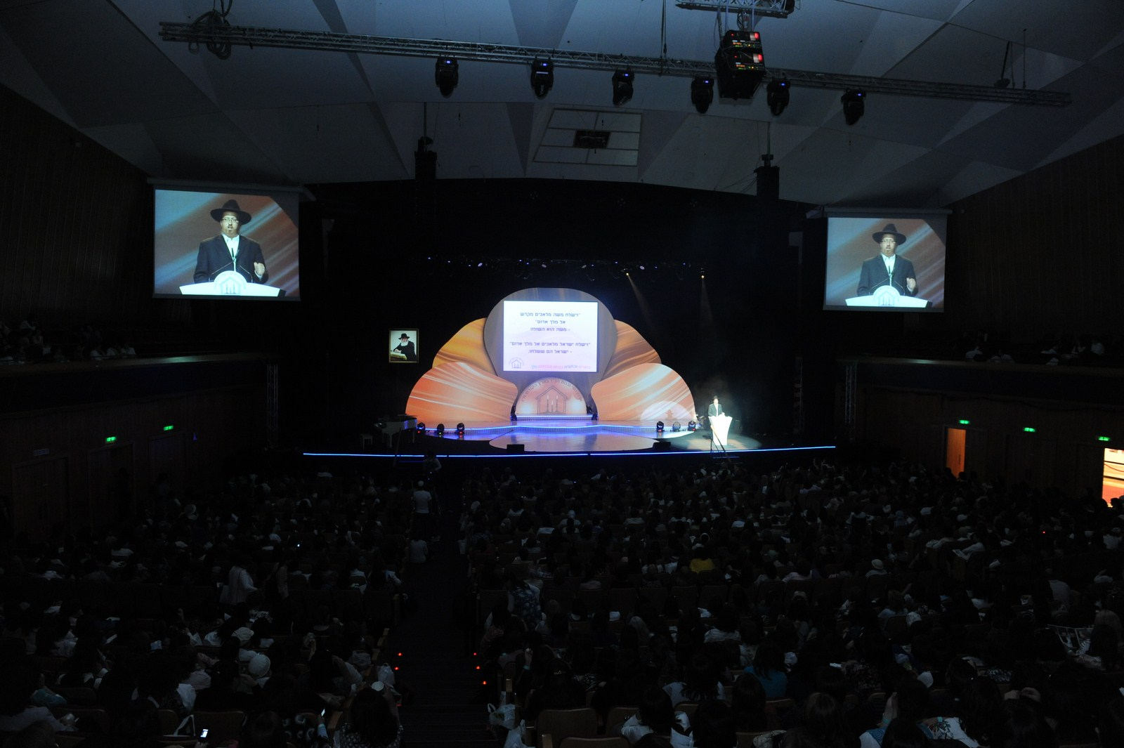 הרב זושא וולף בהרצאה בכנס של נשי חבד